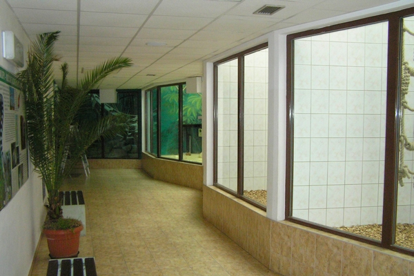 ZOO Bojnice - pavilón opíc